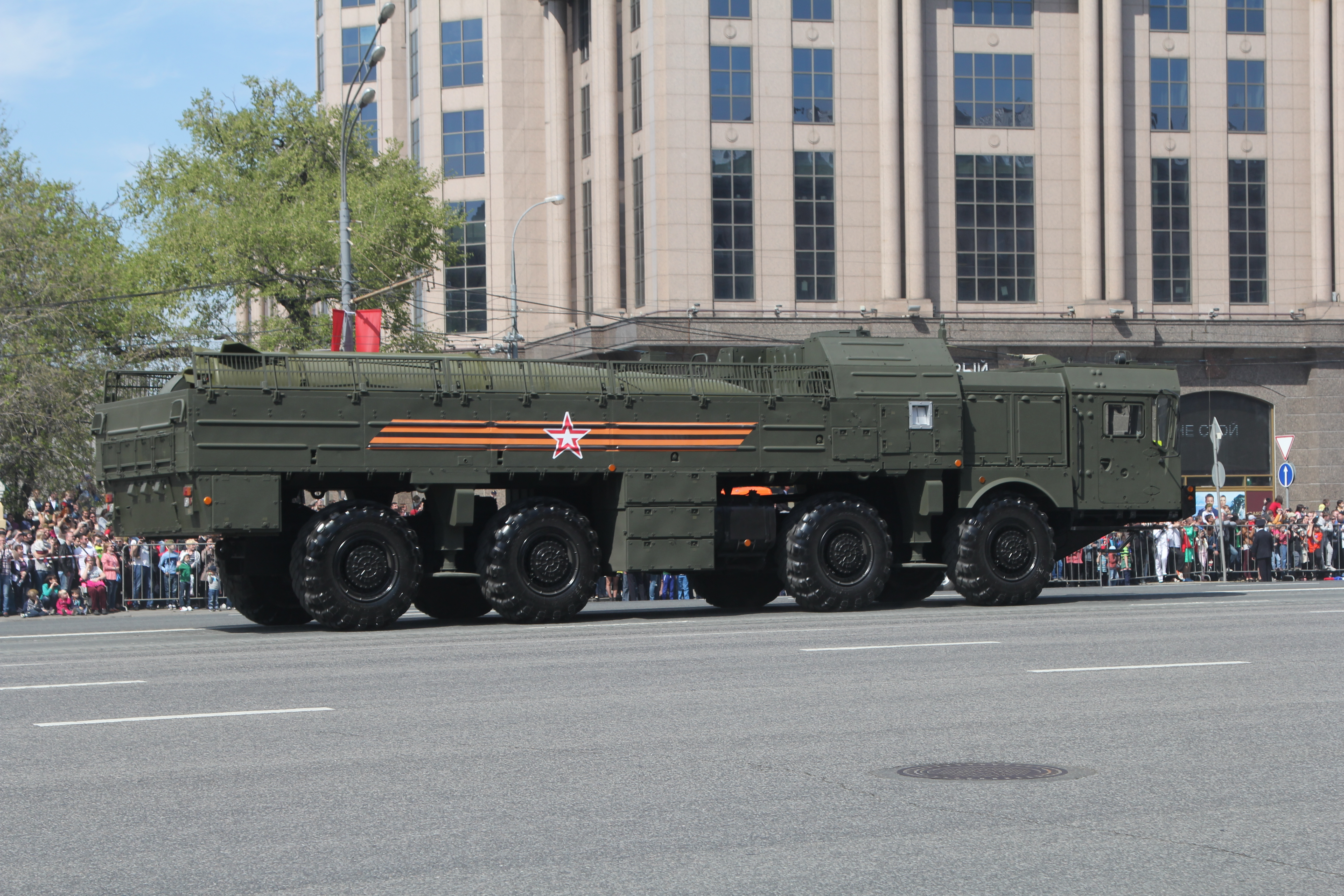 Искандер (ОТРК)